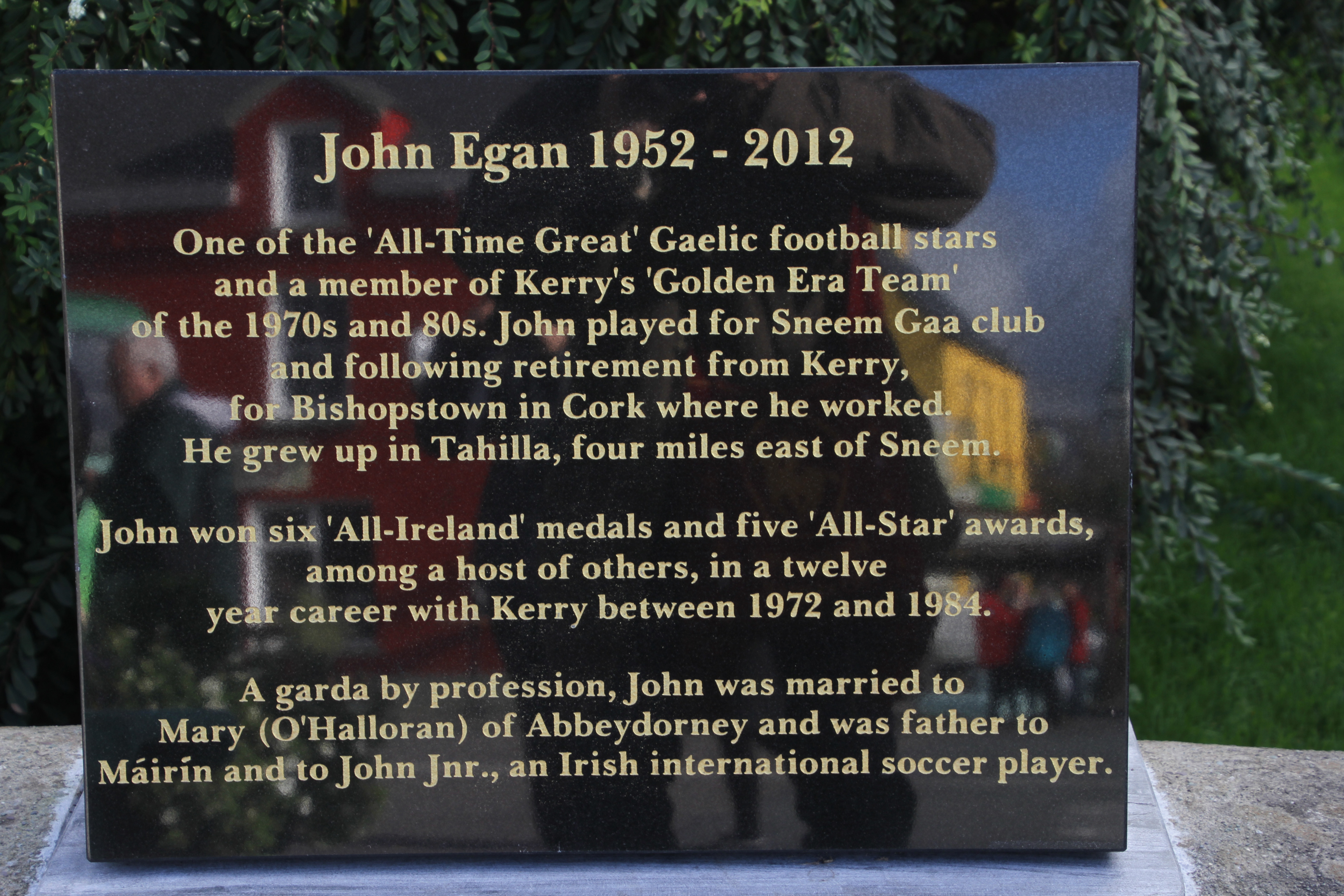 Sneem